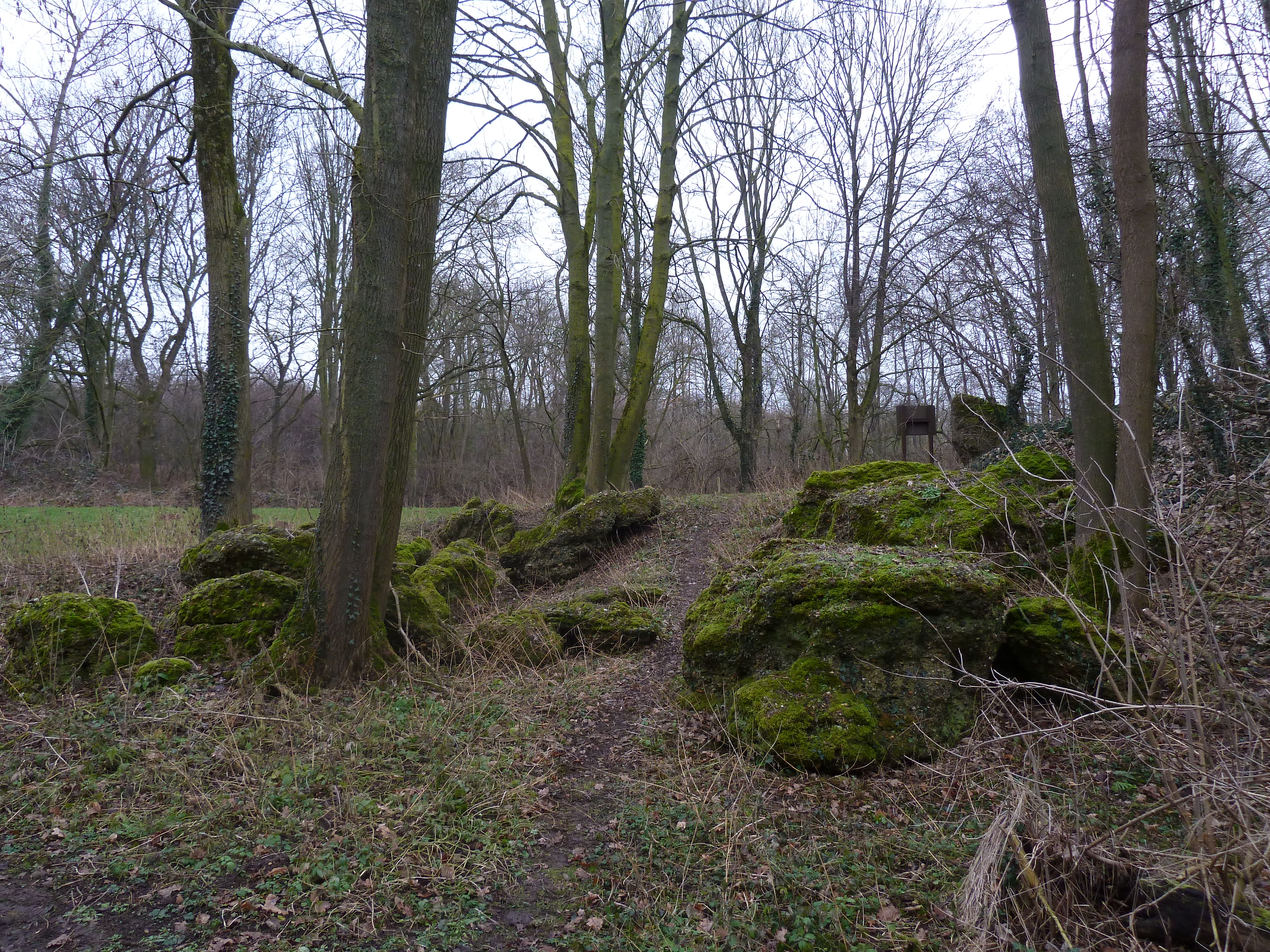 Geologisch monument Örenberg, Cadier en Keer, Nederland